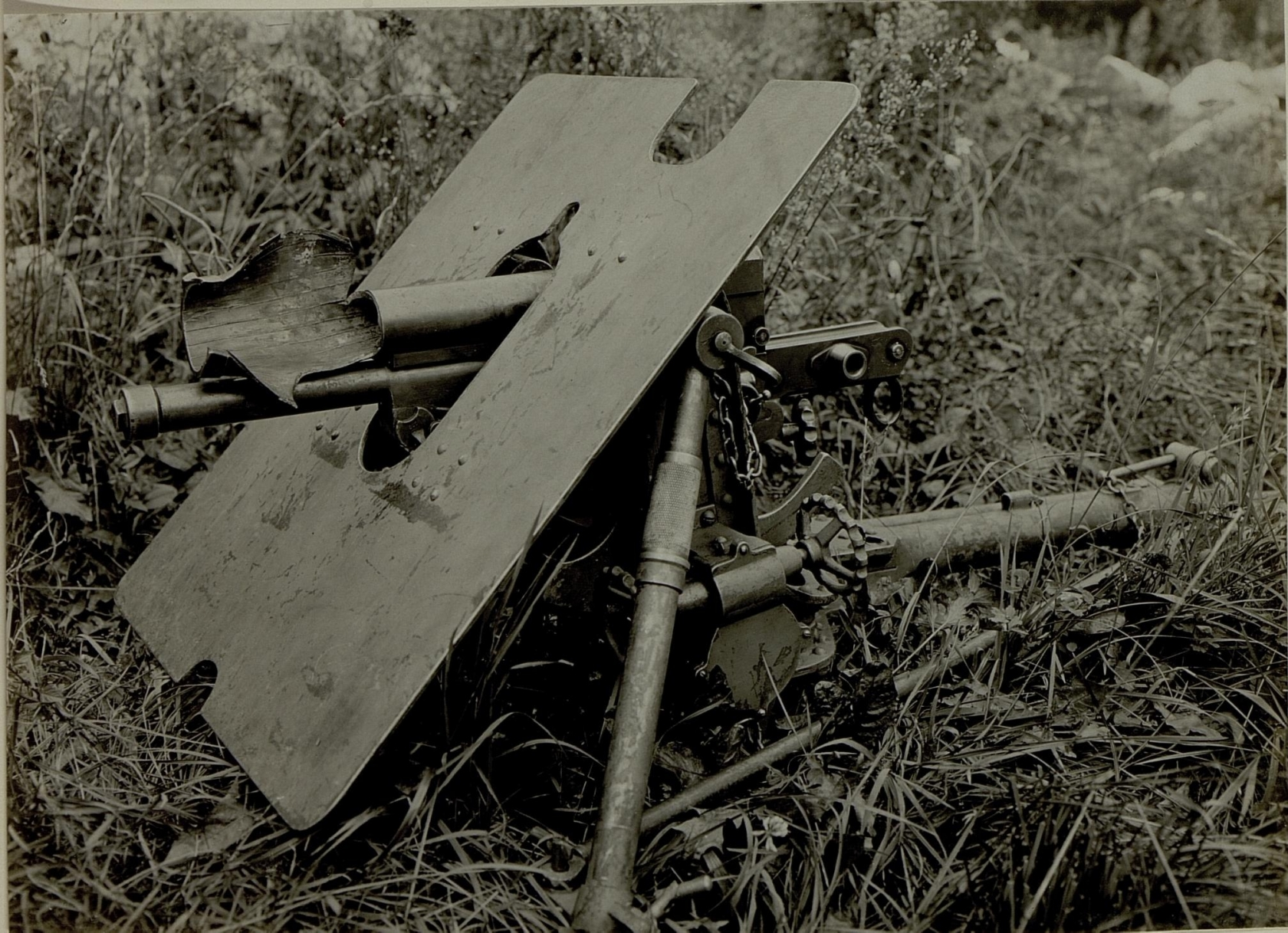 37mm Infanteriegeschütz des Baons III/7 Rohrkrepierer durch eine Minengranatpatrone.